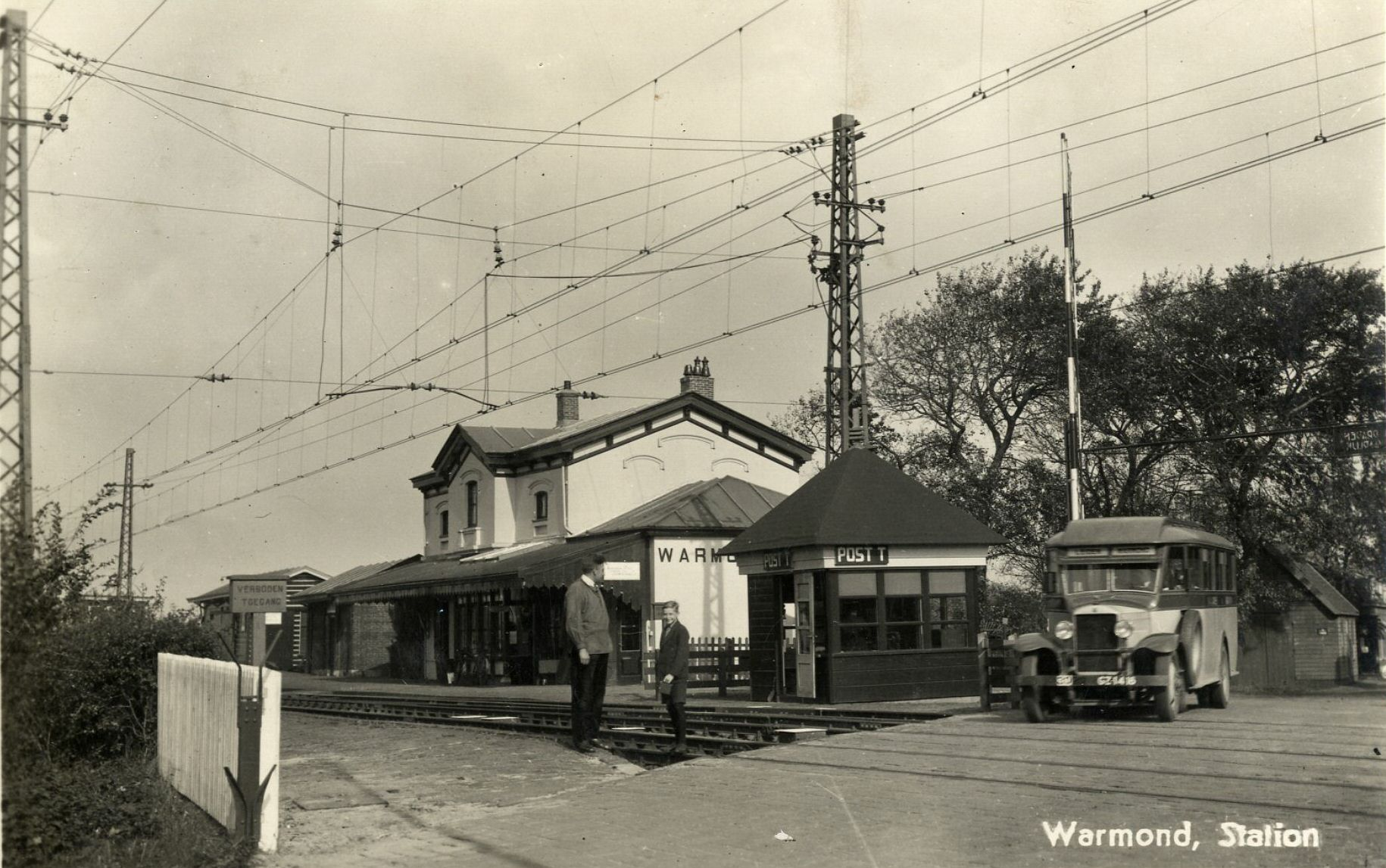 Gezicht op het N.S.-station Warmond te Warmond, met links van de overweg het seinhuis post T.